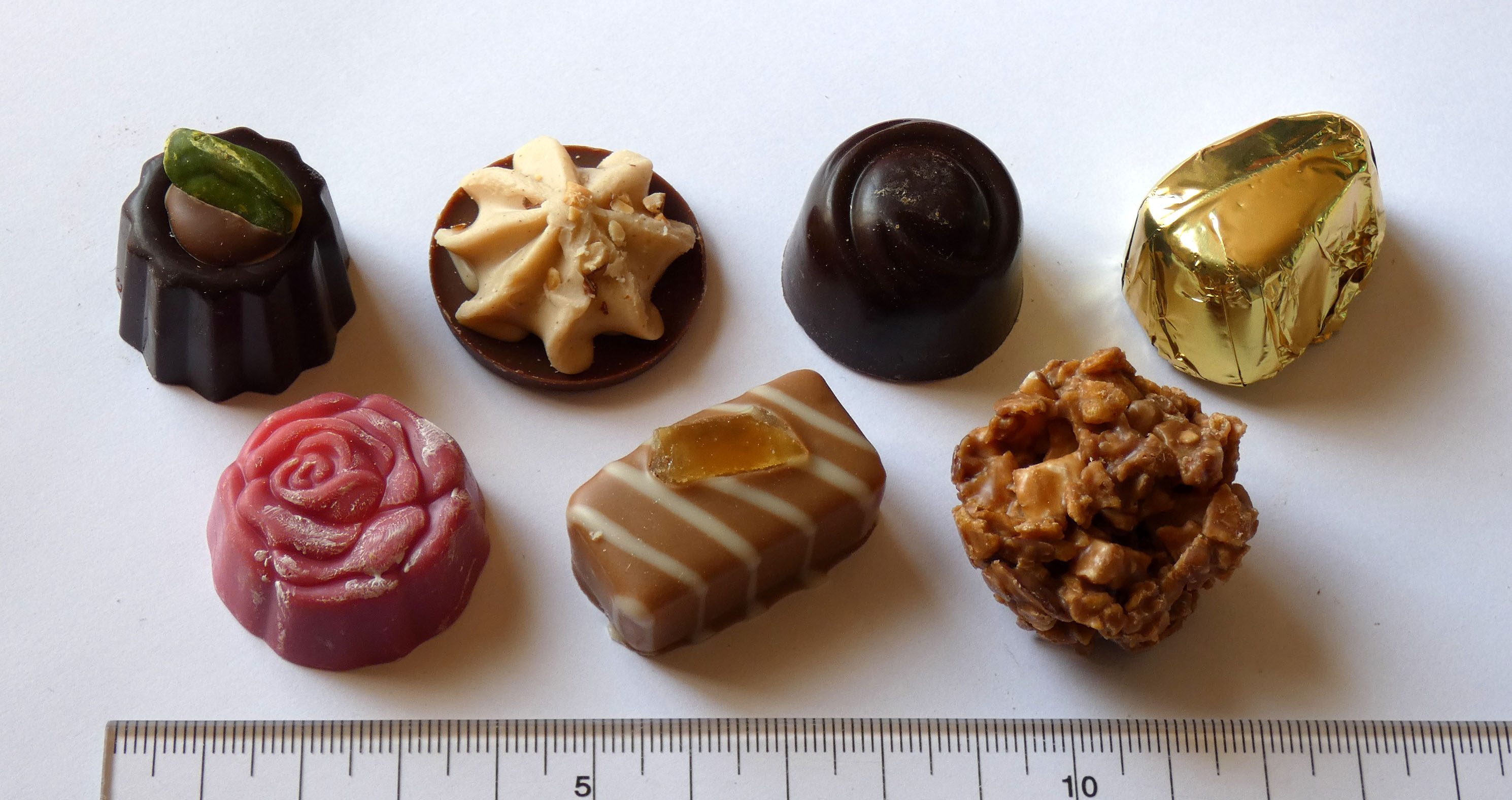 神戸風月堂の「フランスの伝統菓子をイメージした」というショコラ。後列左から、カヌレ、パリブレスト、スイート、ミルク、前列左から、ロセシャンパン、ウィークエンド、アップルパイ。